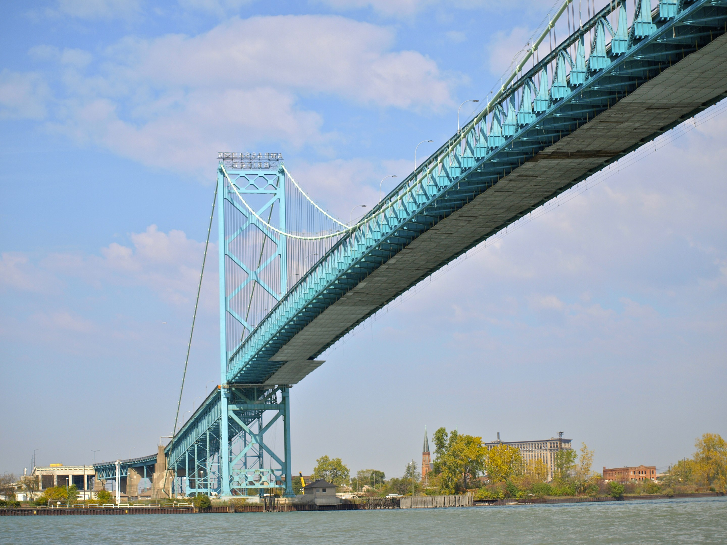 Detroit River